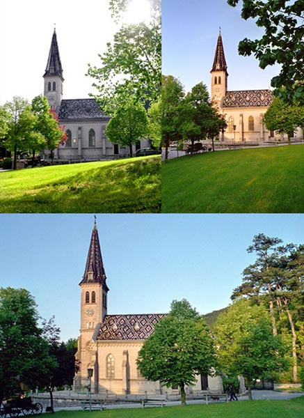 Die Pfarrkirche Herz Jesu in der niederösterreichischen Gemeinde Weissenbach an der Triesting. Seitenansicht.